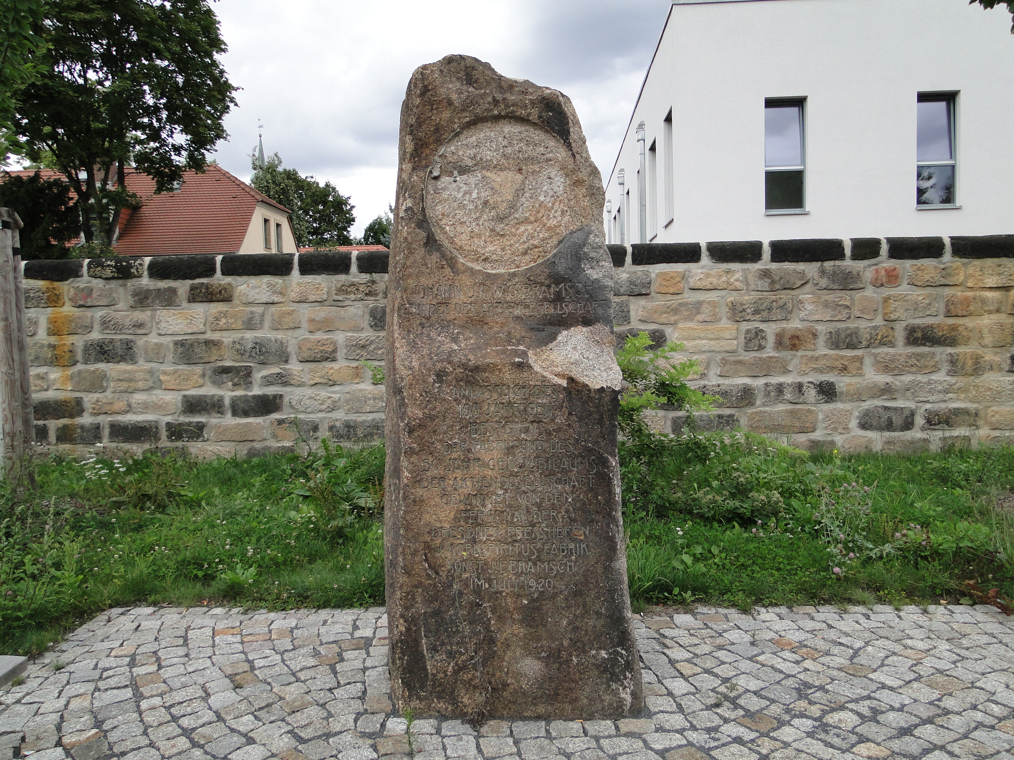 Denkmal für Johann Ludwig Bramsch in der Dresdner Friedrichstadt